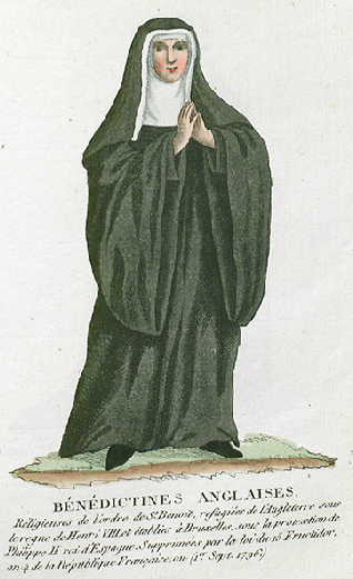 Collection de costumes de tous les ordres monastiques, supprimés à differentes époques, dans la ci-devant Belgique, Bruxelles, Philippe Joseph Maillart et sœur, 1811